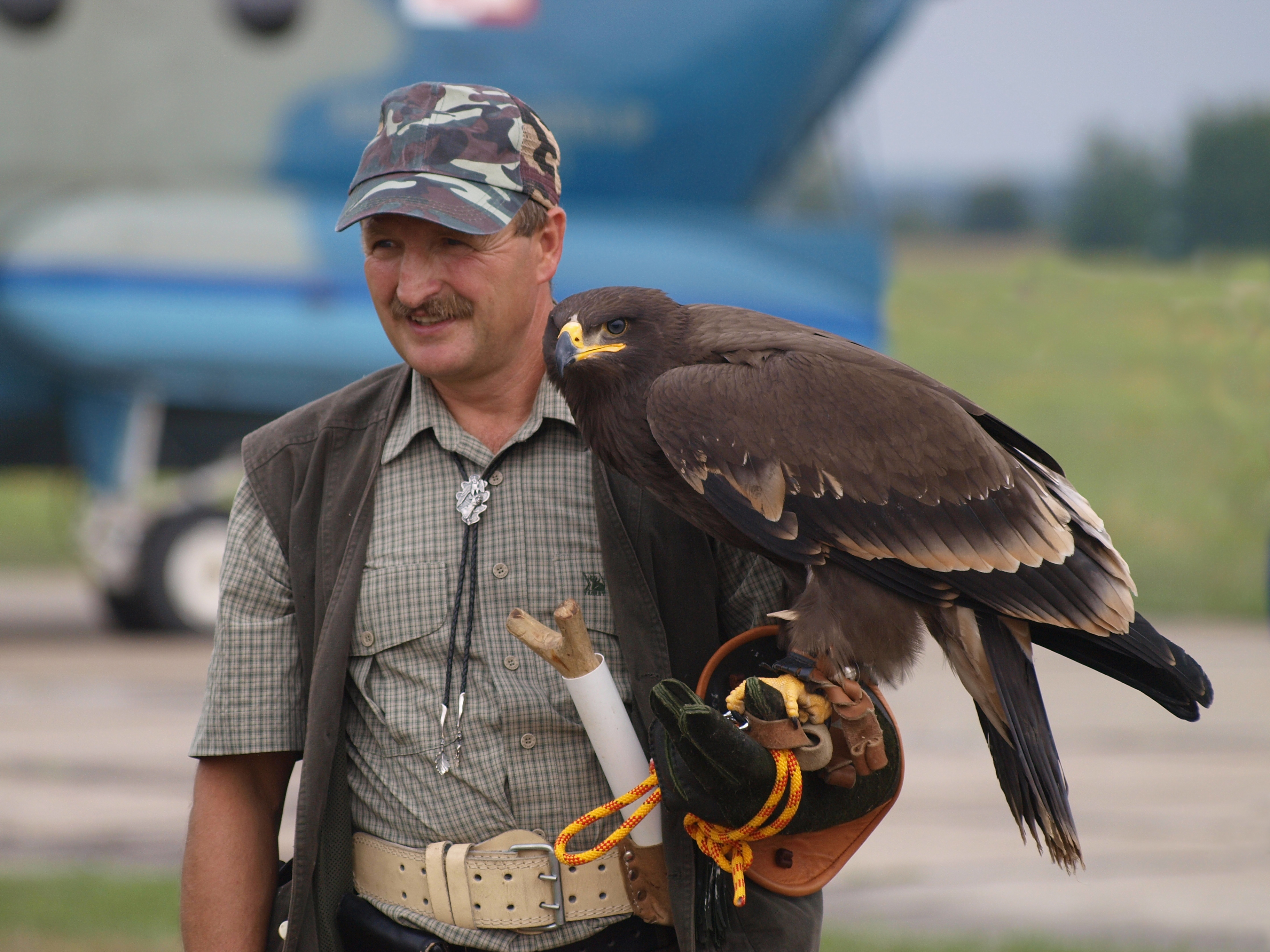 Sokolnik K.Domański(Bełchatów) z orłem stepowym podczas pracy na lotnisku.